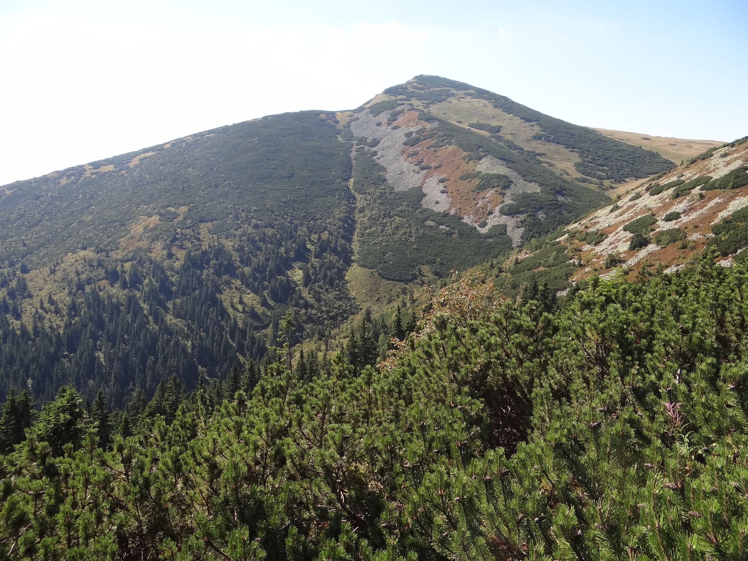 Veľký Kriváň, Snilovska dolina